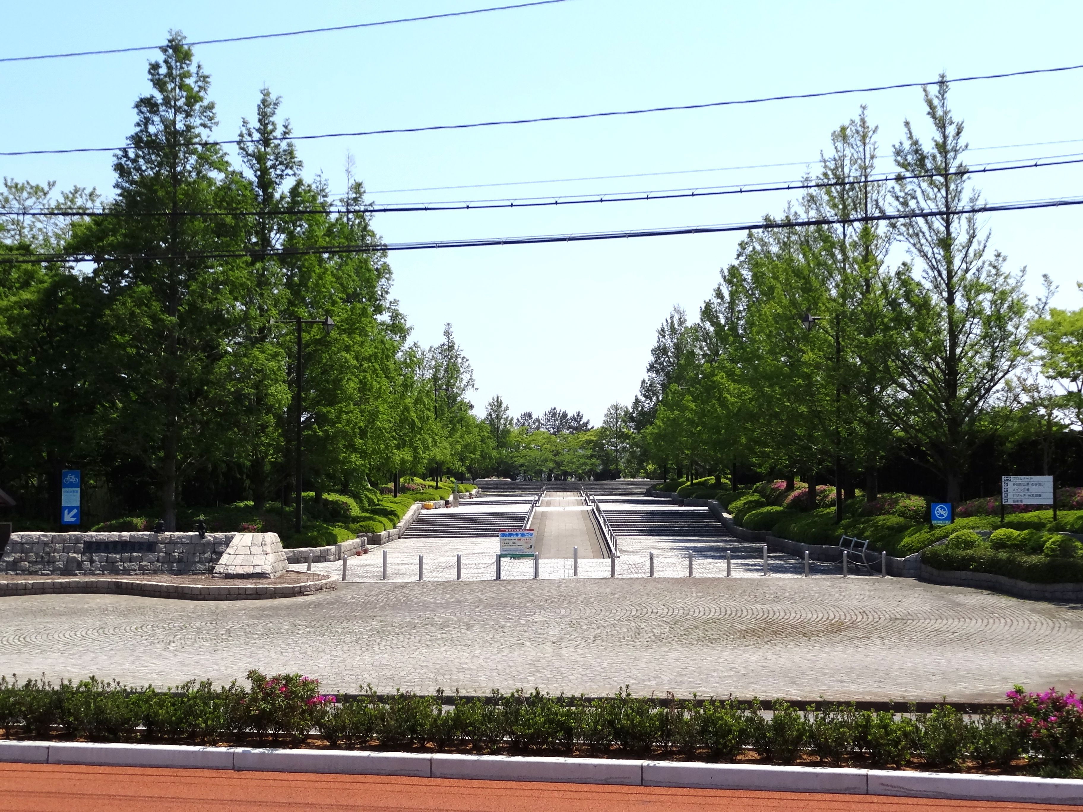 鳥屋野潟公園（鐘木地区エントランス広場付近）